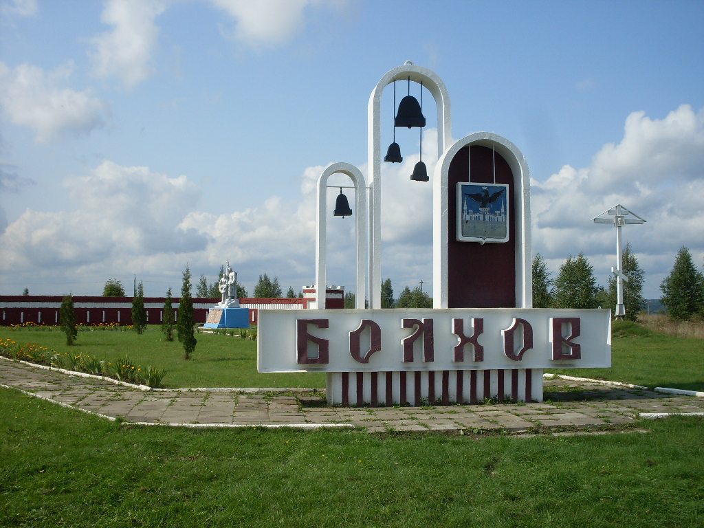 Братская могила советских воинов, погибших в боях с фашистскими захватчиками: улица Маяковского, Болхов, Болховский район, Орловская область